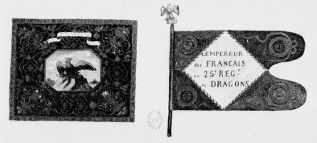 Etendard du 25e régiment de dragons pendant le premier Empire, par E. Grammont, publié dans l' Historique du 25e régiment de dragons, 1665-1890, par le capitaine de Bourqueney